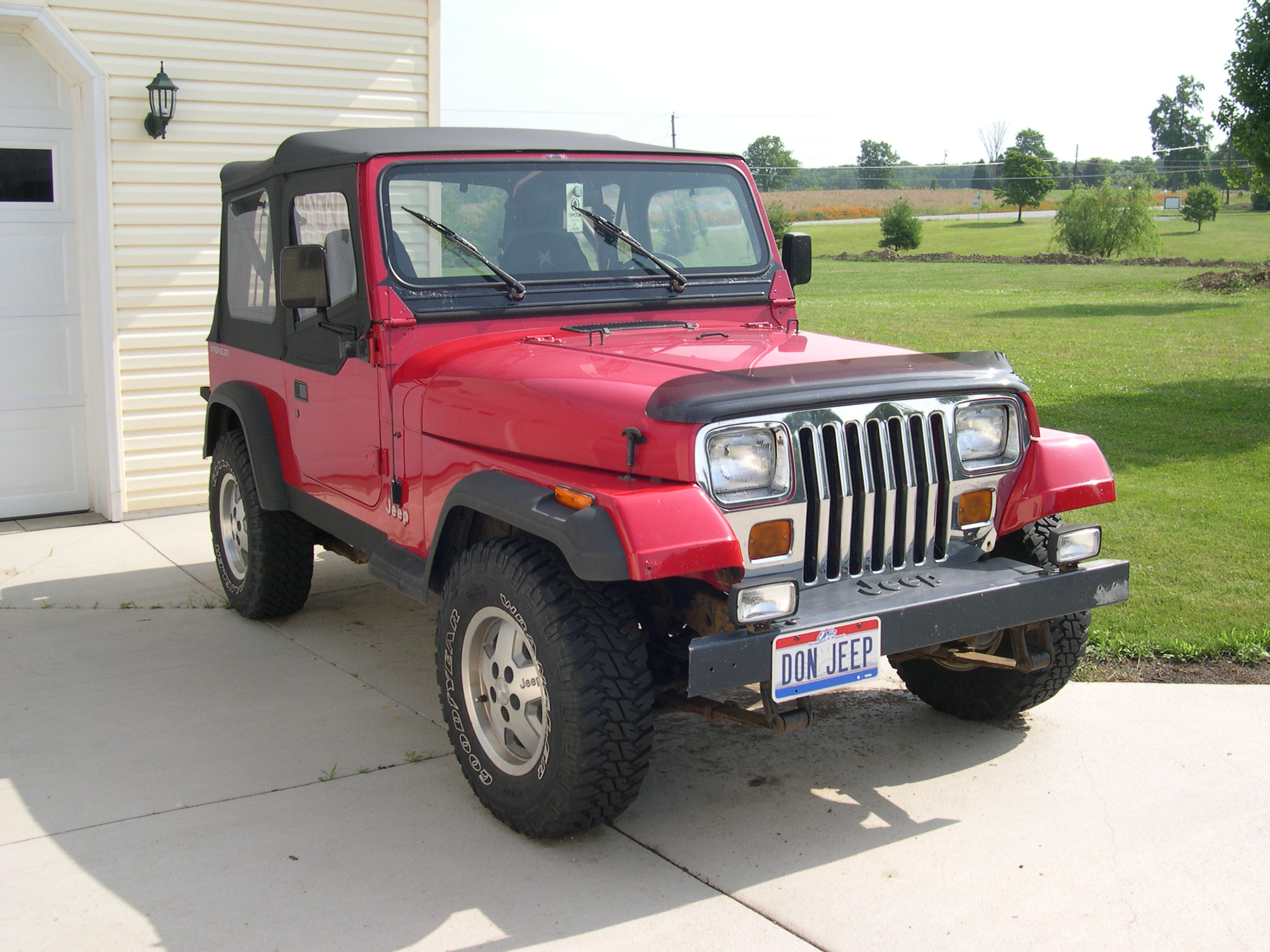 1992 Jeep YJ